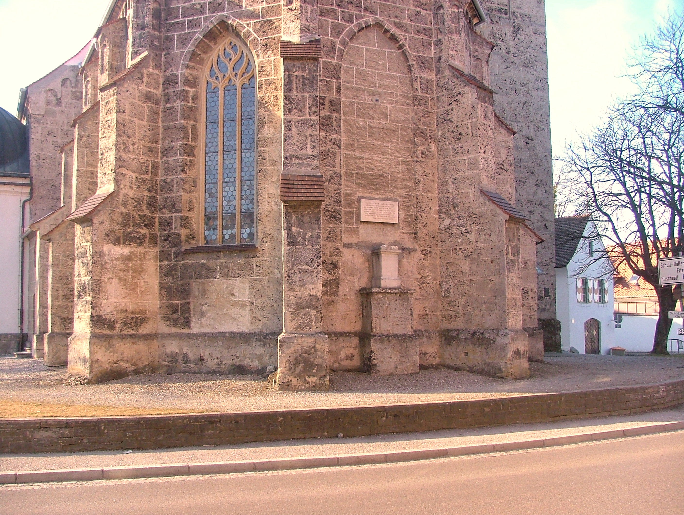 Altarstein eines römischen Merkur-Altars an der Pfarrkirche St. Martin, Obergünzburg